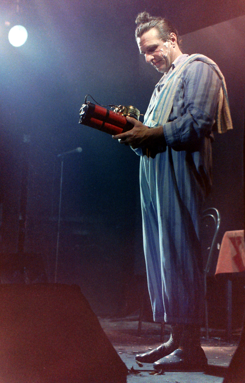 Auftritt von Jango Edwards mit Dynamitstangen und Zeitschaltuhr